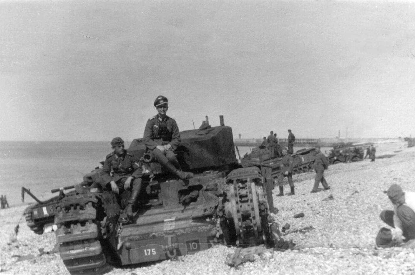 Panzerbergungstrupp PzPiBatt.49 10.PD .Zertörte brittische Panzer werden am Strand von Dippe geborgen